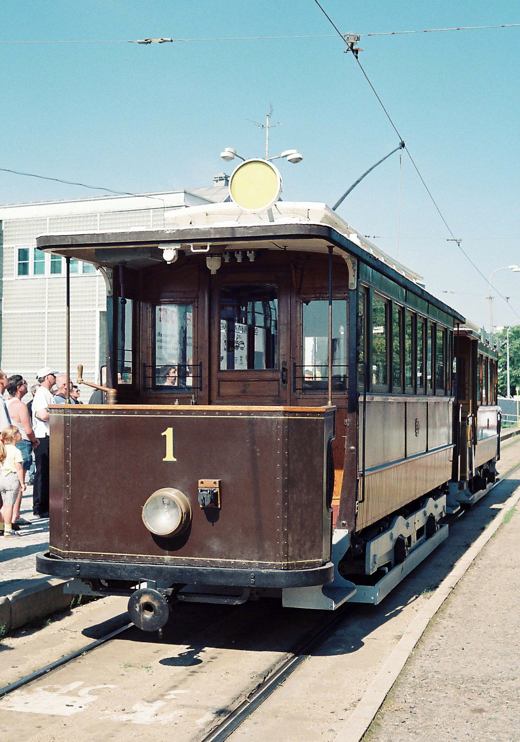 Tramvaj evidenčního čísla 1 na dopravní nostalgii v roce 2000 – archiv Jiřího Vobeckého